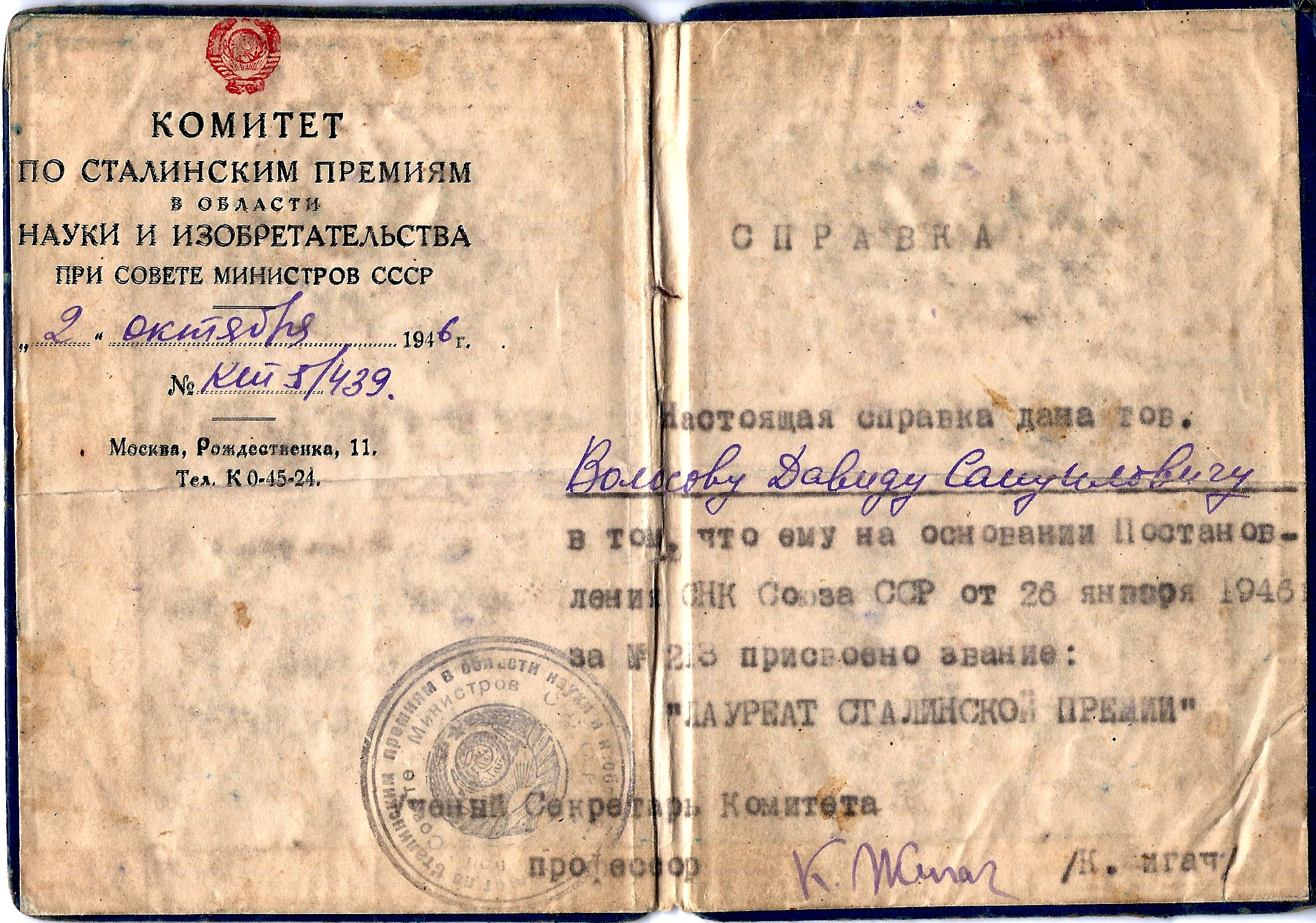 фото диплома Сталинской премии